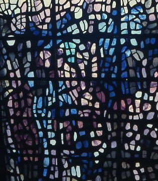 Eglise en France (?), vitrail d'Elvire Jan